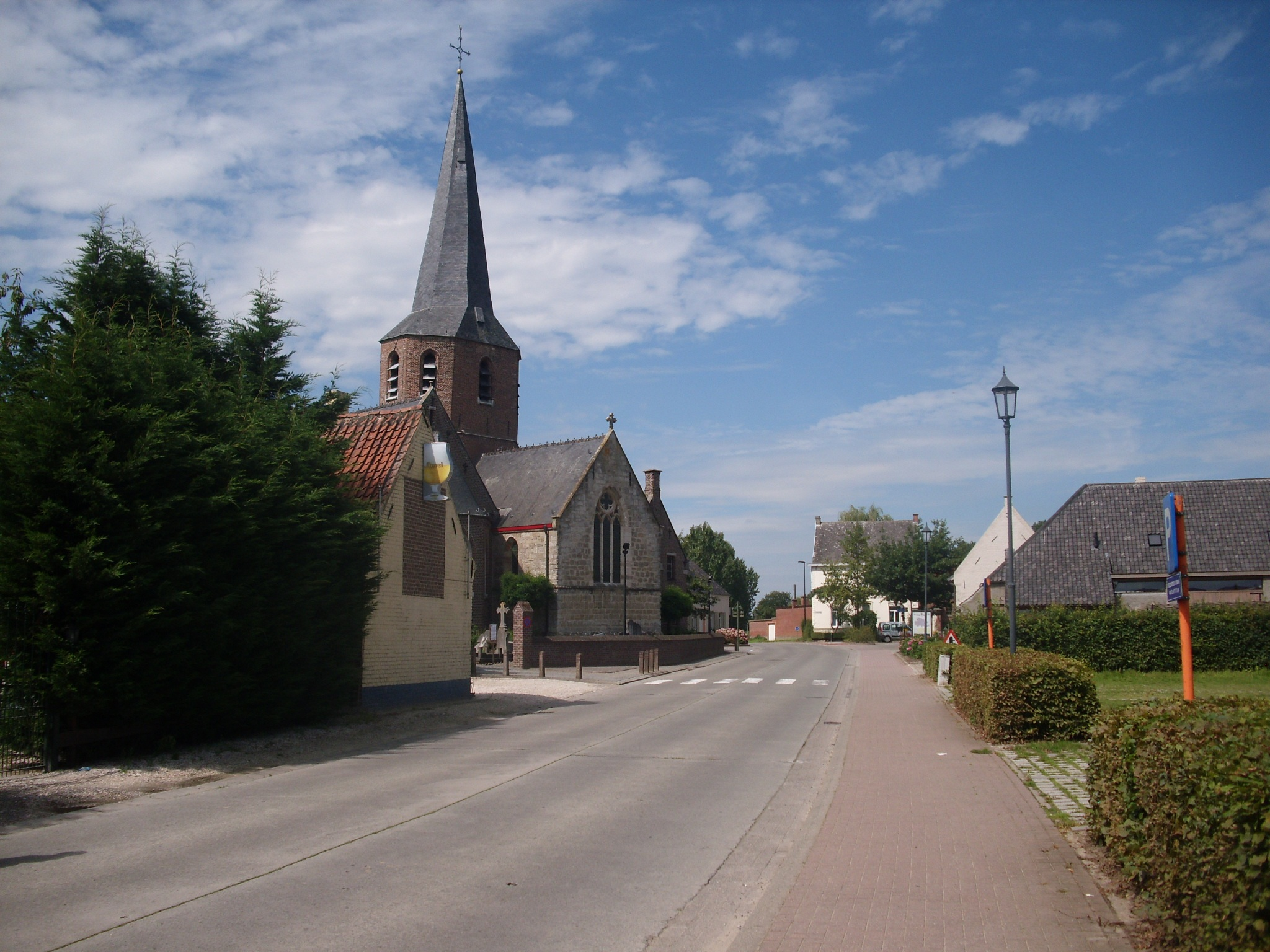 Dorpscentrum van Baaigem - Gavere - Oost-Vlaanderen - Vlaams Gewest - België